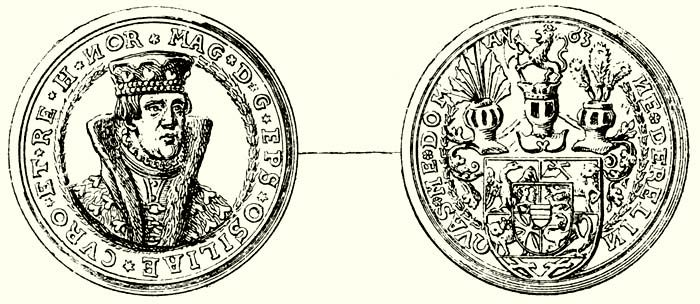 Magnus av Øsel